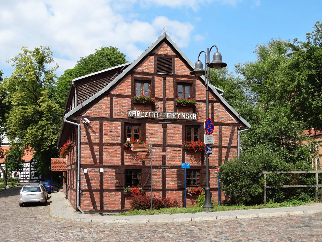 Budynek szachulcowy zwany Karczmą Młyńską zlokalizowany na Wyspie Młyńskiej w Bydgoszczy, zbud. około 1835 roku